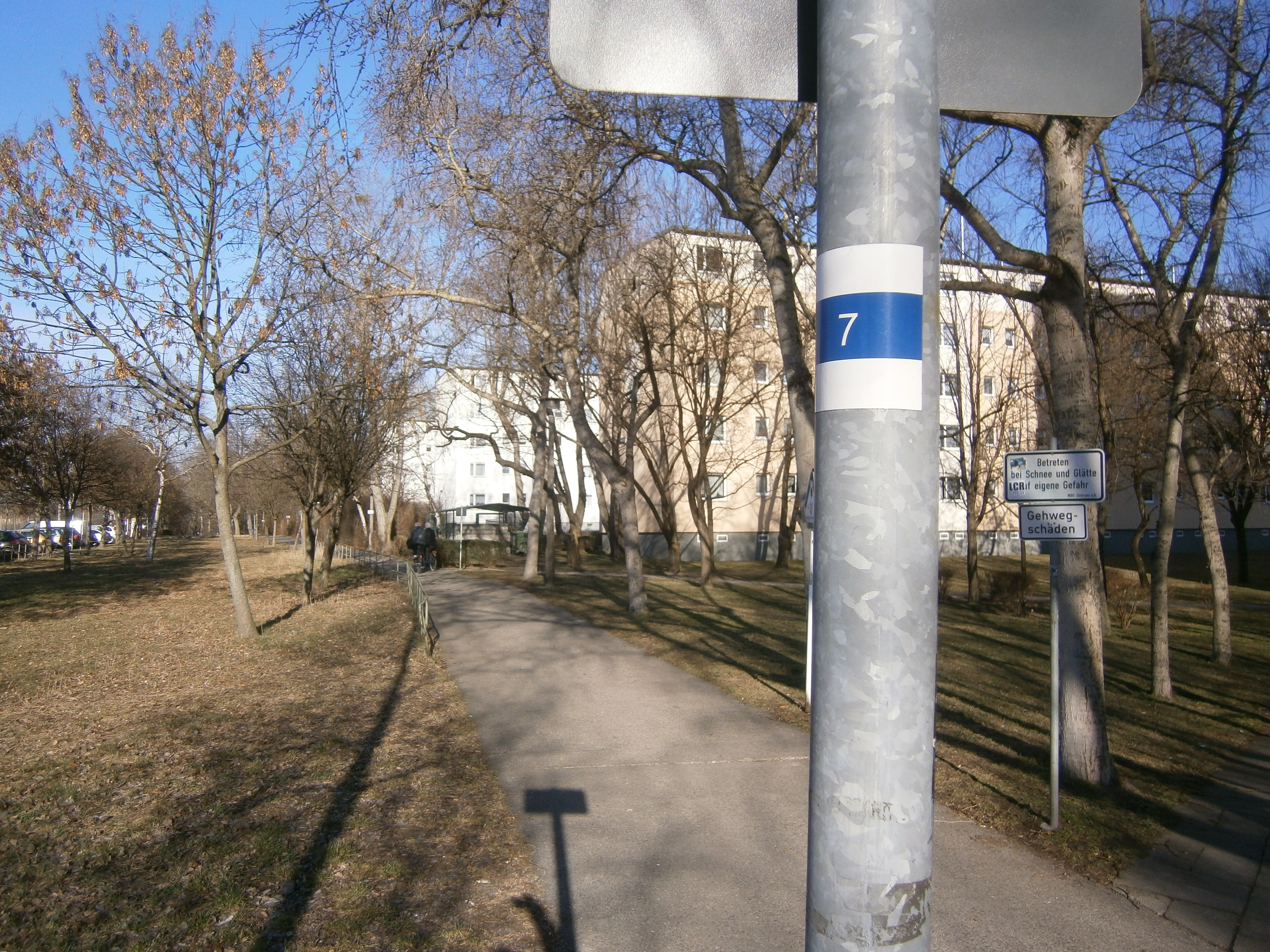 Der Hönower Weg ist mit Nummer 7 einer der 20 grünen Hauptwege Berlins. Nummer 7 verbindet den Park am Märchenbrunnen im Zentrum mit dem Stadtrand in Hönow. Hier der Weg entlang der Michelangelostraße in Berlin Prenzlauer Berg.